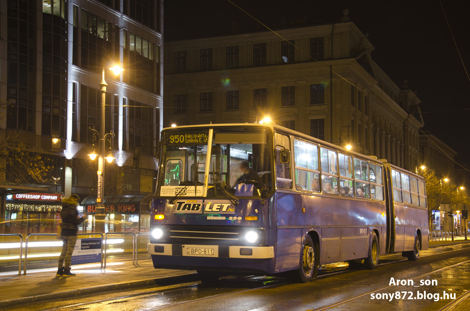 950-es jelzésű Ikarus 280-as busz az Astoriánál (frsz. BPO-811)